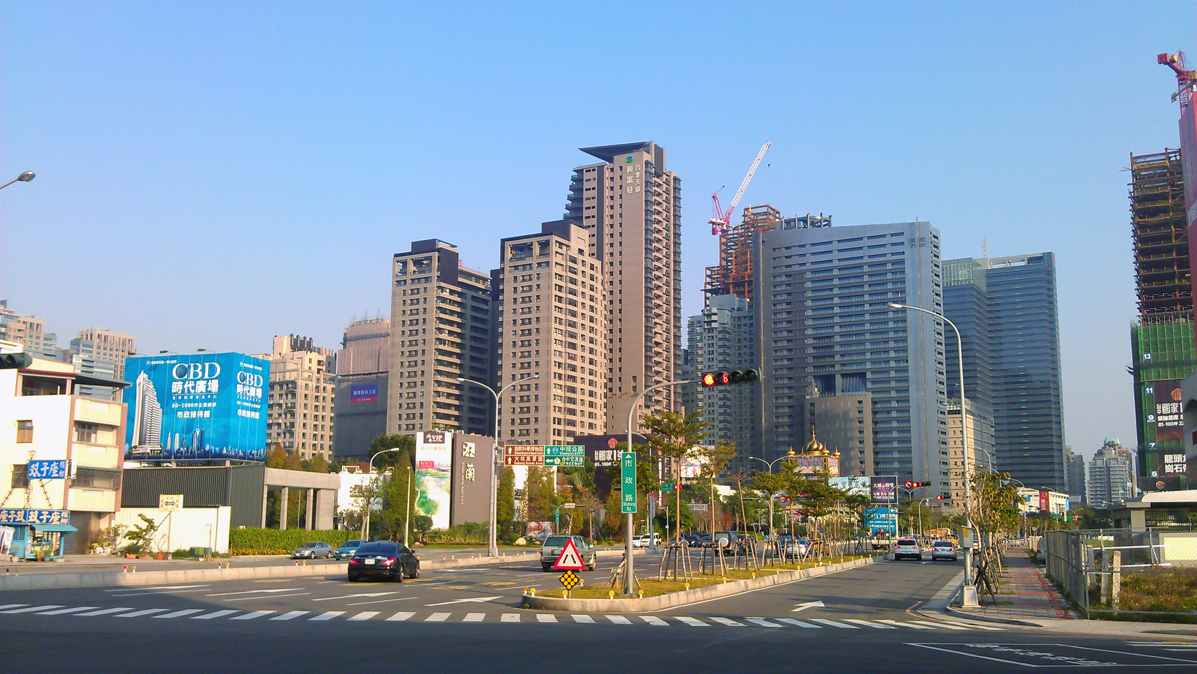 西屯區市政路